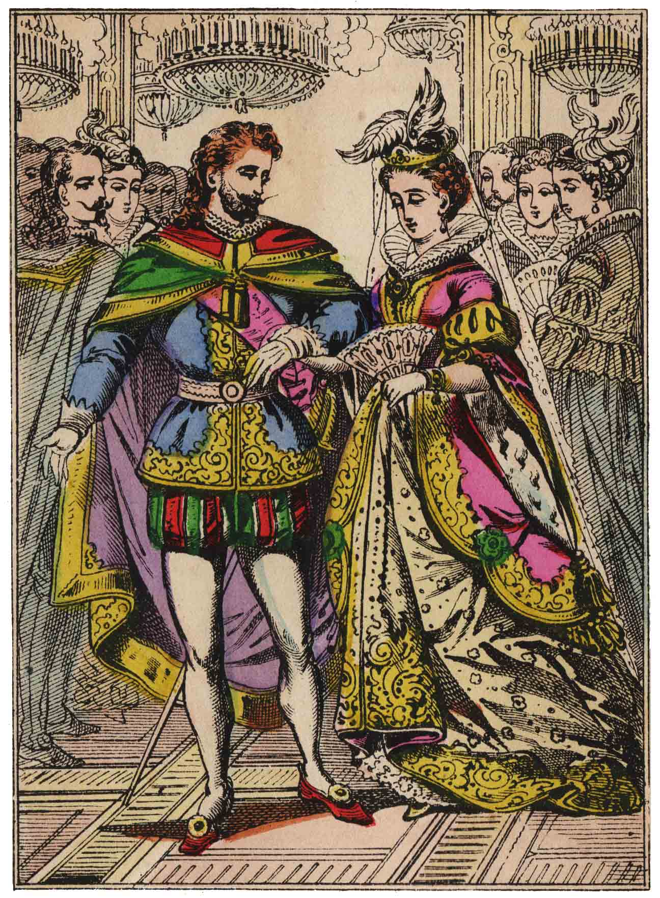 Images d'Épinal : Cendrillon